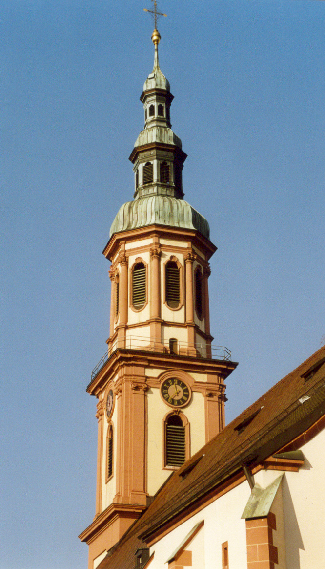 Offenburg: die barocke Turmspitze der Heilig-Kreuz-Kirche. Schönes Beispiel für die prachtvolle Formensprache des Barock.